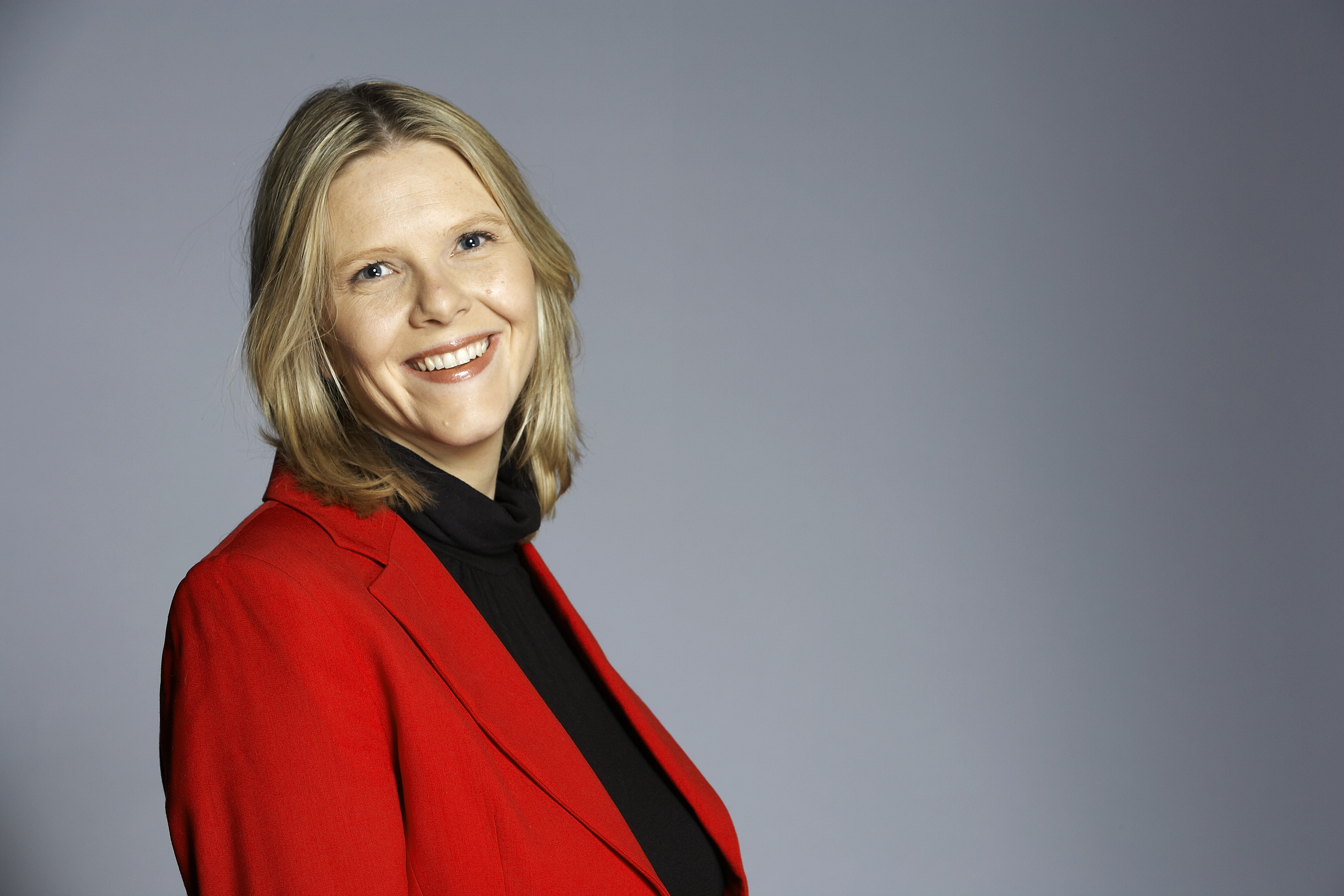 Sylvi Listhaug valgkampbilde for Stortingsvalgkampen 2009